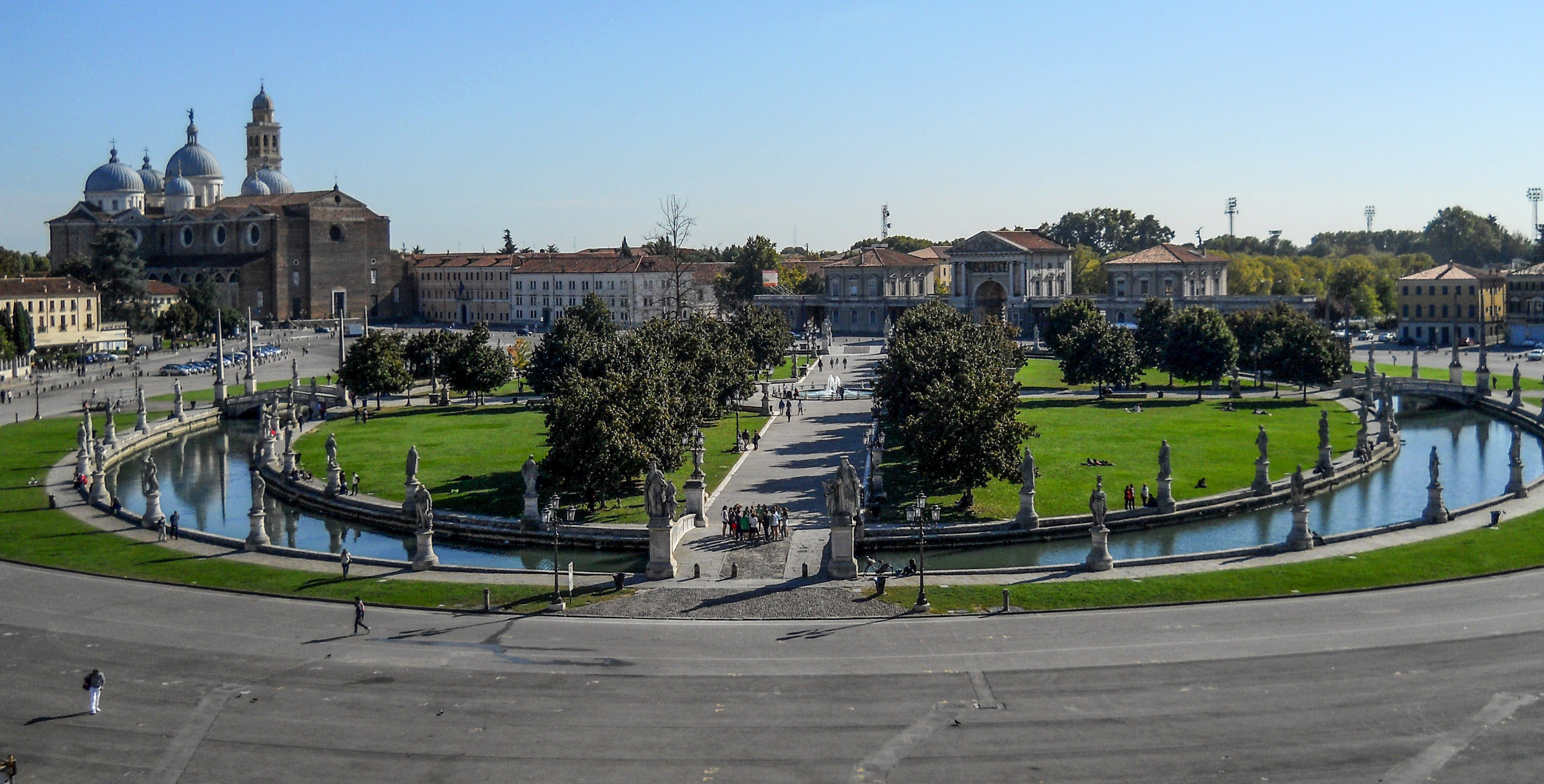 Prato della Valle, a Padova.